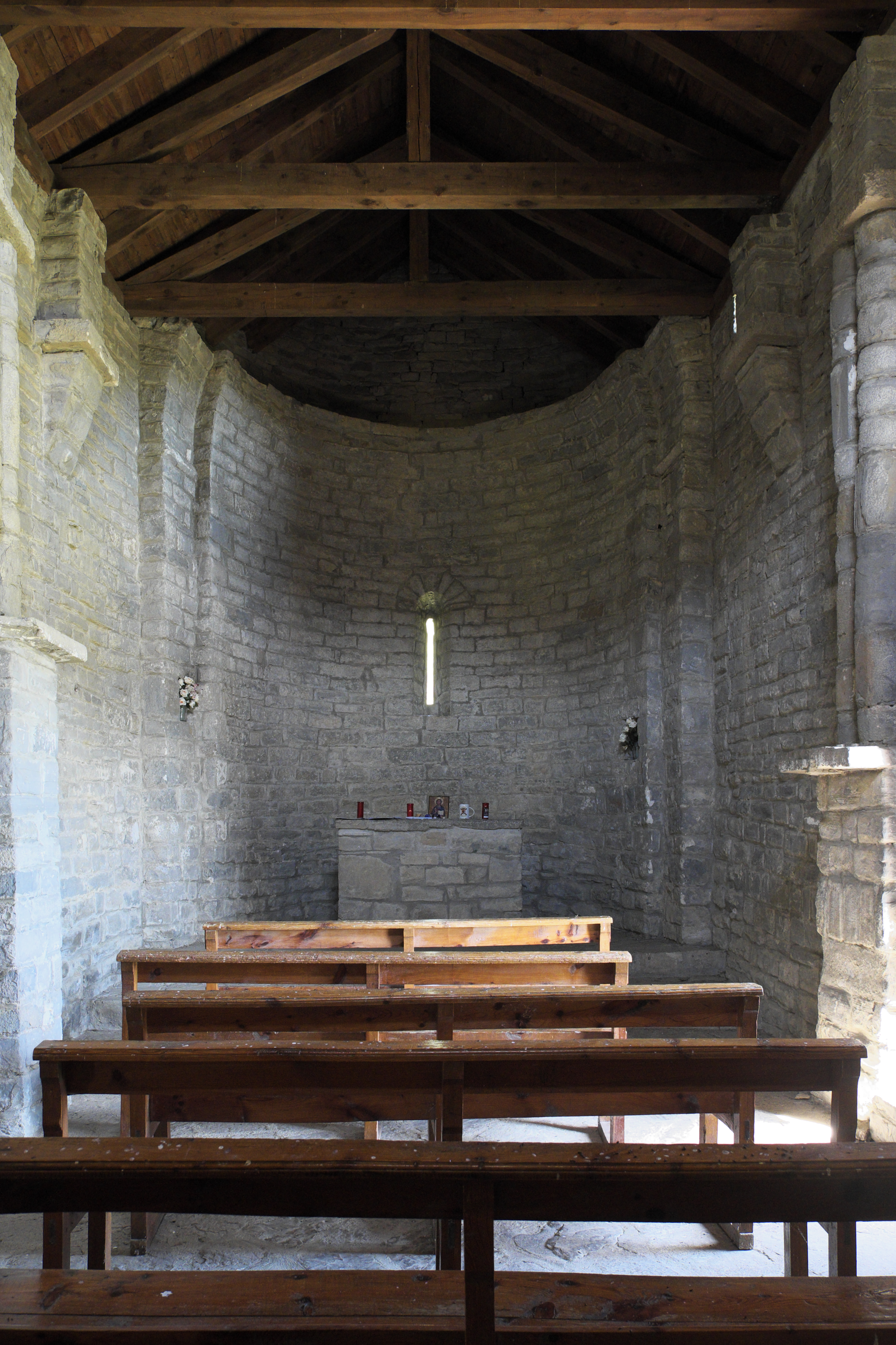 Kirche San Juan de Busa in der Gemeinde Biescas in der Provinz Huesca (Aragón/Spanien), Innenraum